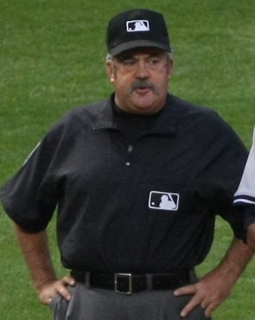 Tim Tschida